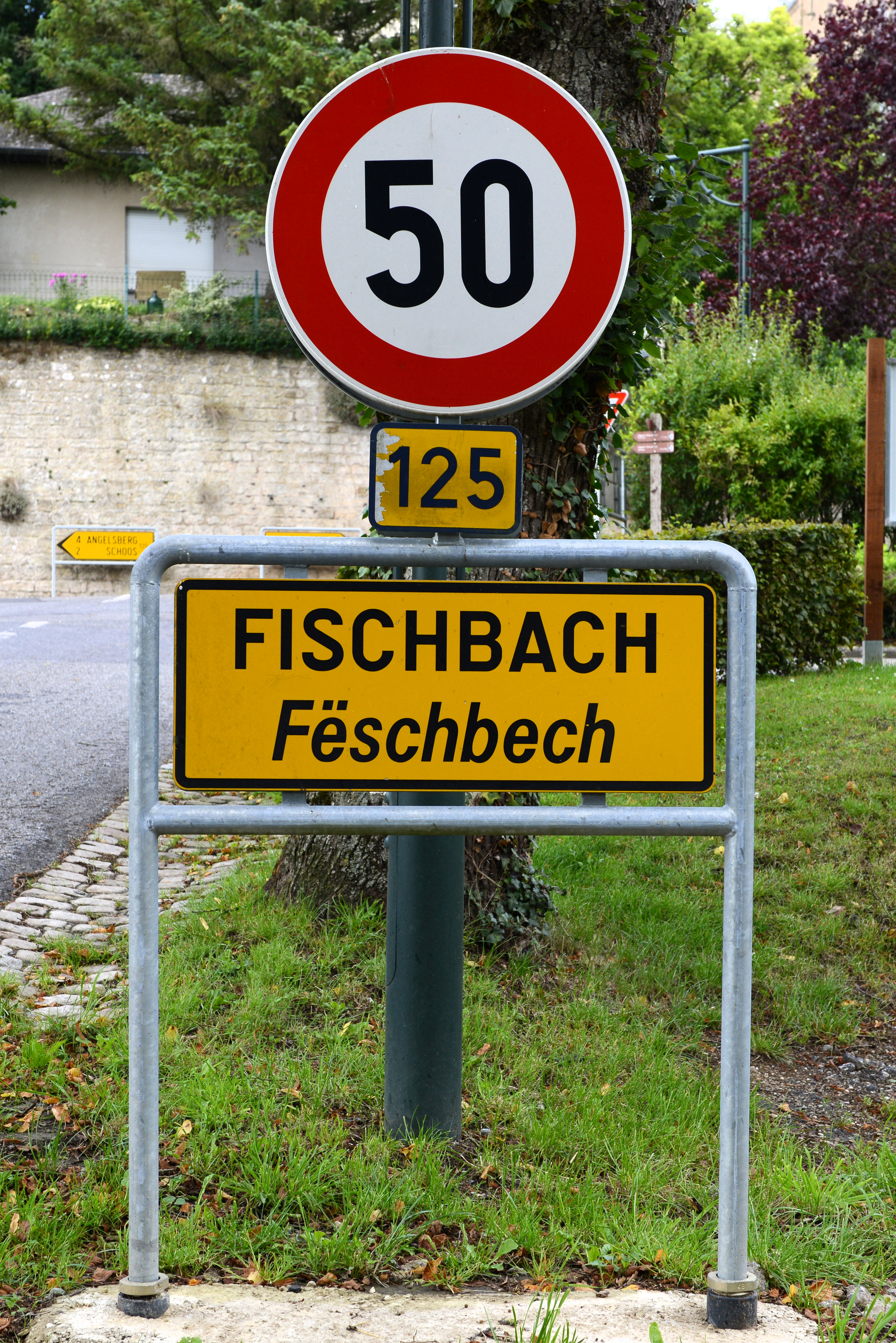 An der Entree vu Fëschbech.